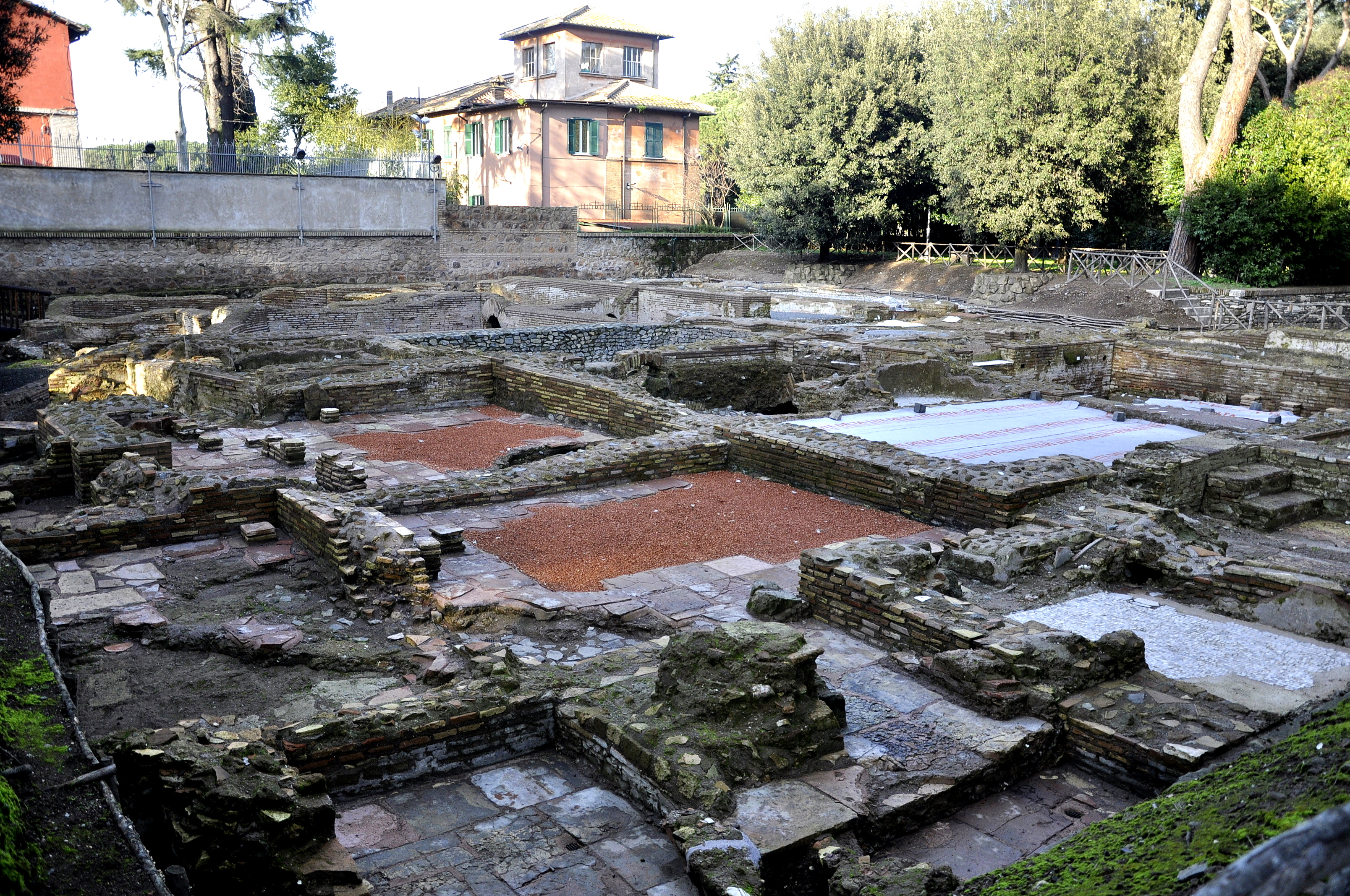 De Villa Capo di Bove, van Herodes Atticus, langs de Via Appia te Rome